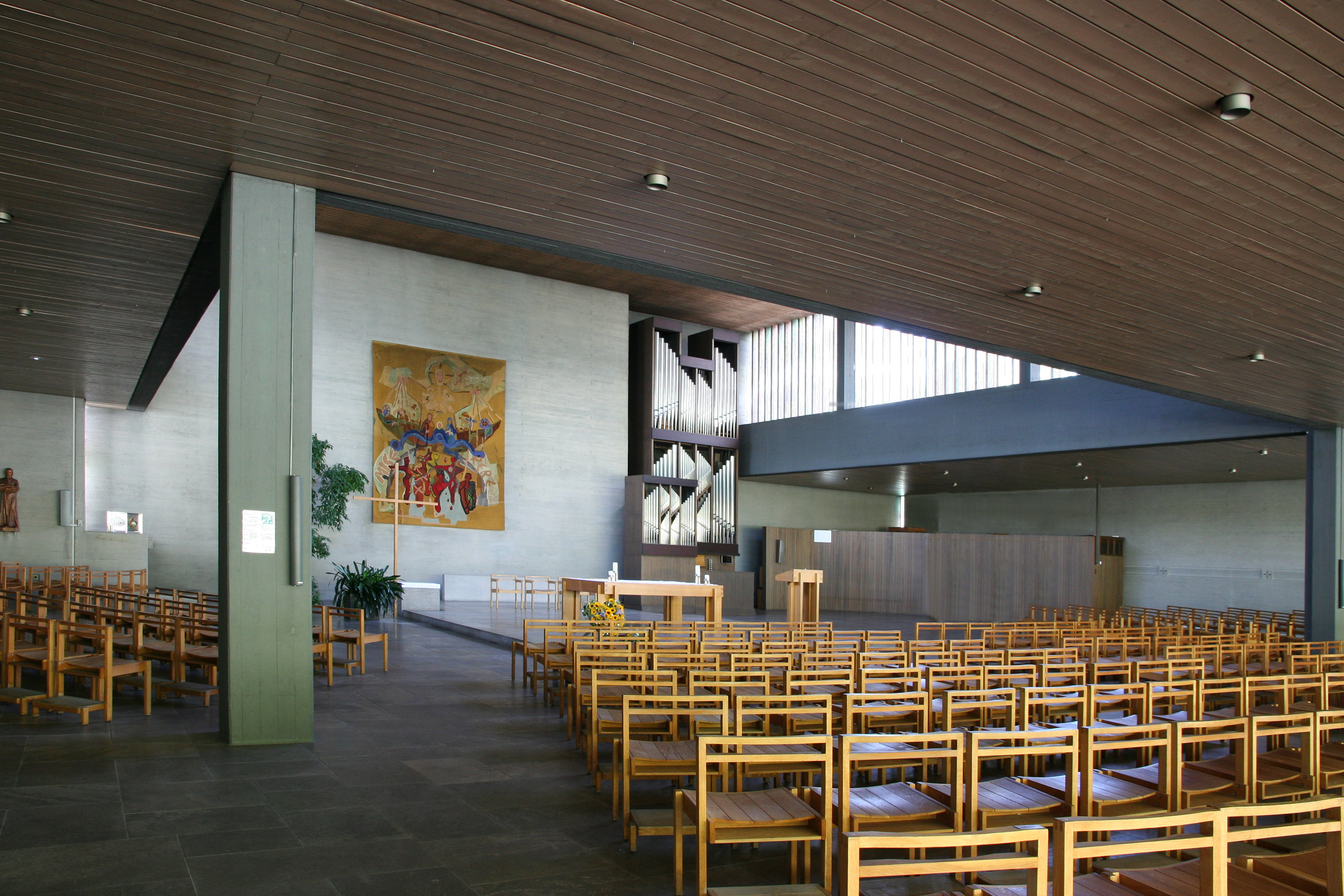 Römisch-katholische Pfarrkirche St. Marien Langnau ZH